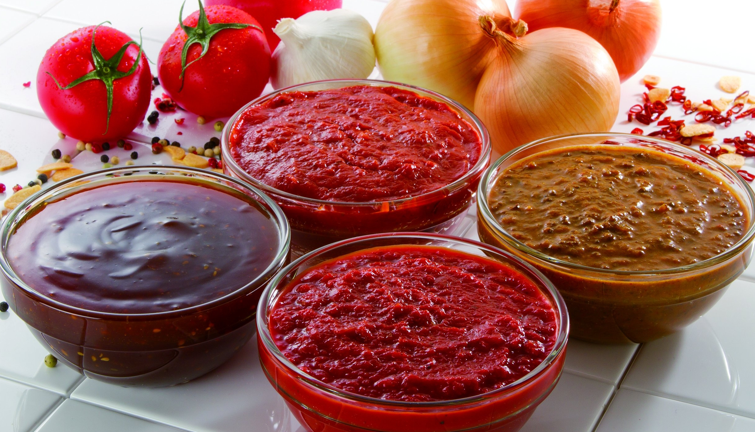 テンフォーで使用されているトマトソース